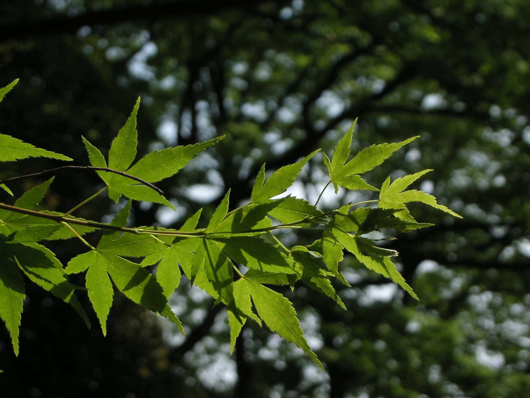 紅葉前の楓の葉 Acer palmatum